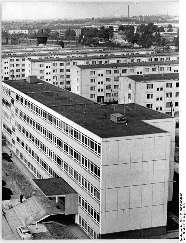 Berlin, Friedrichsfelde, Polytechnische Oberschule Zentralbild Studré 30.8.1967 Berlin: Neue Polytechnische Oberschule Eine der vier neuen Schulen, die am 1.9.1967 in Berlin eingeweiht werden, ist die 14. Polytechnische Oberschule in Friedrichsfelde, Rosenfelder Ring. Bei dieser Schule handelt es sich um einen Typenbau für 700 Schüler. Sie verfügt über 18 Klassenräume, vier Fachräume, zwei Werkräume und eine Turnhalle.